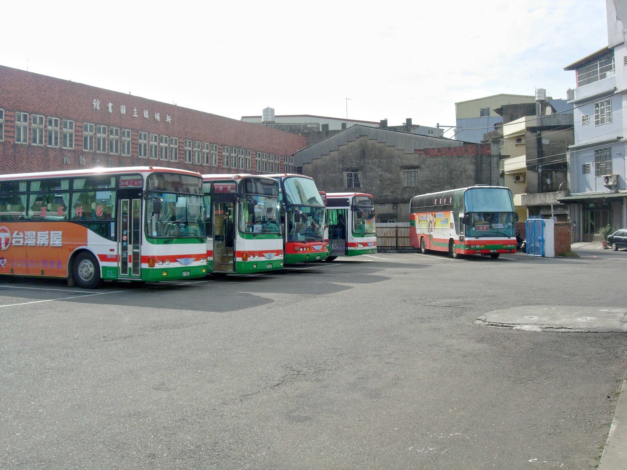 中文（台灣）: 新竹客運新埔站車場